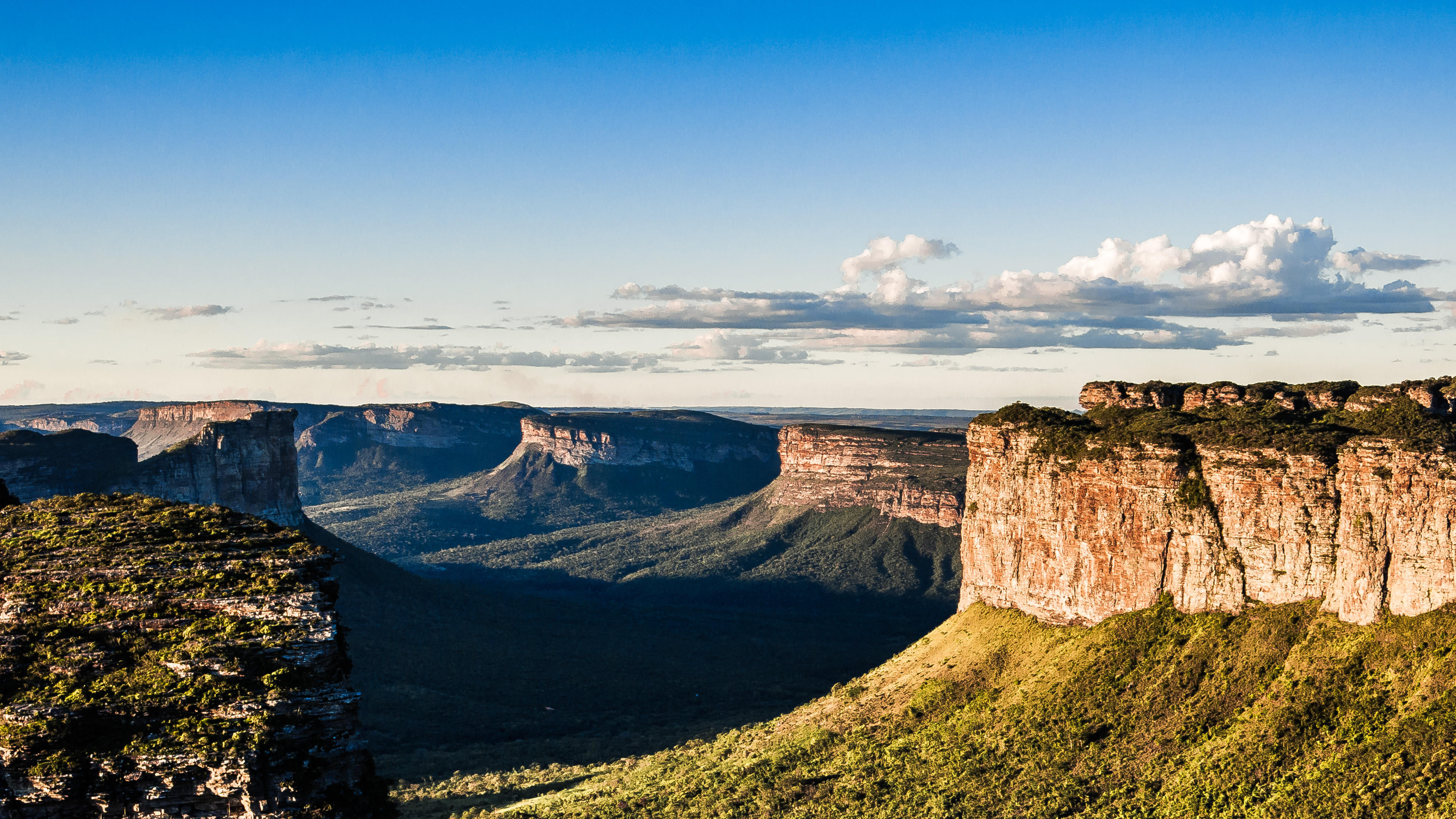 Foto da chapada diamantina vista pelo morro do pai inacio